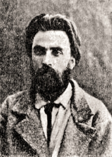 Vladimir Karpovič Debogorij-Mokrievič